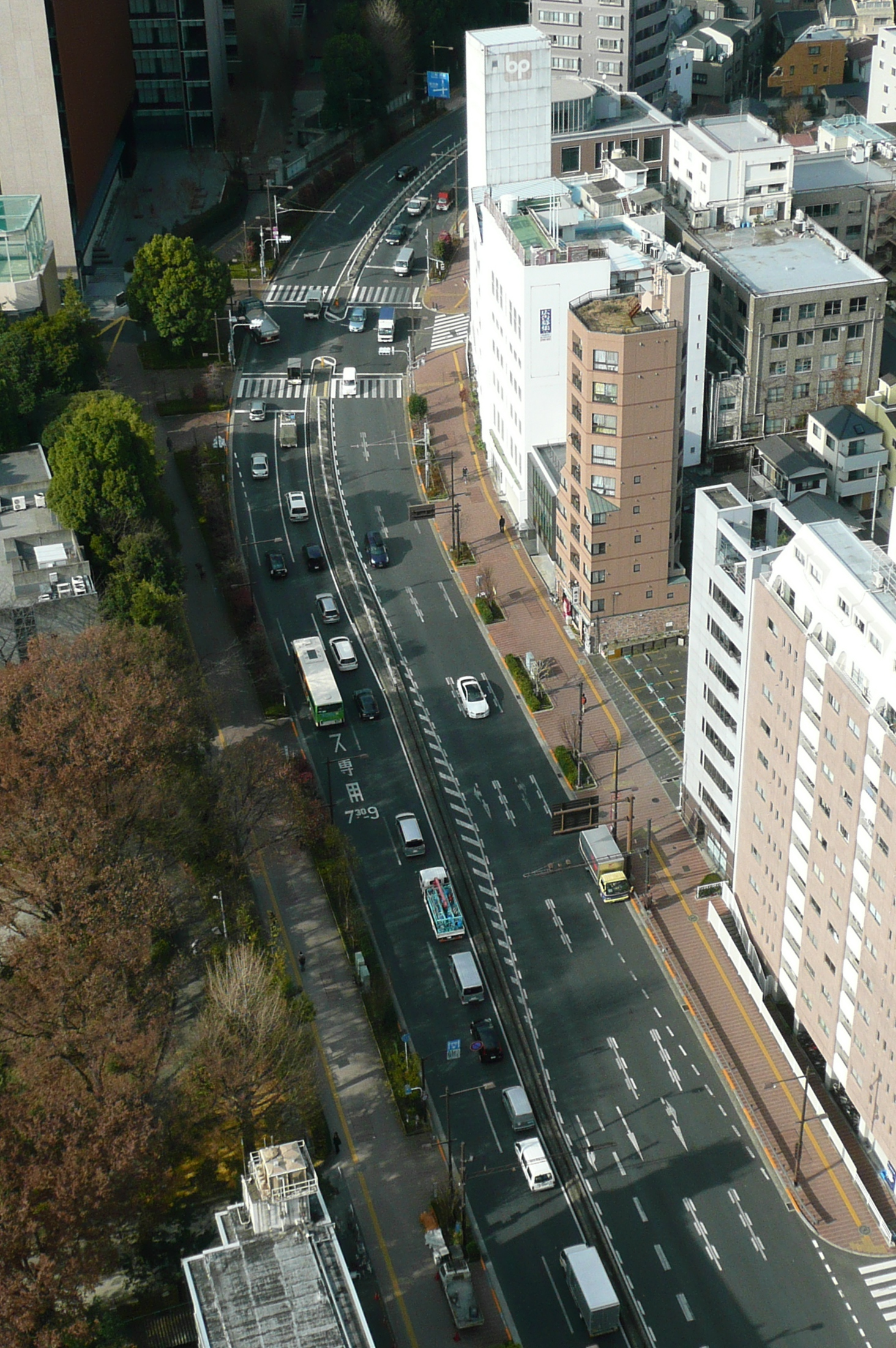 国道254号。文京シビックセンター展望フロアから撮影。写真上が川越方面。